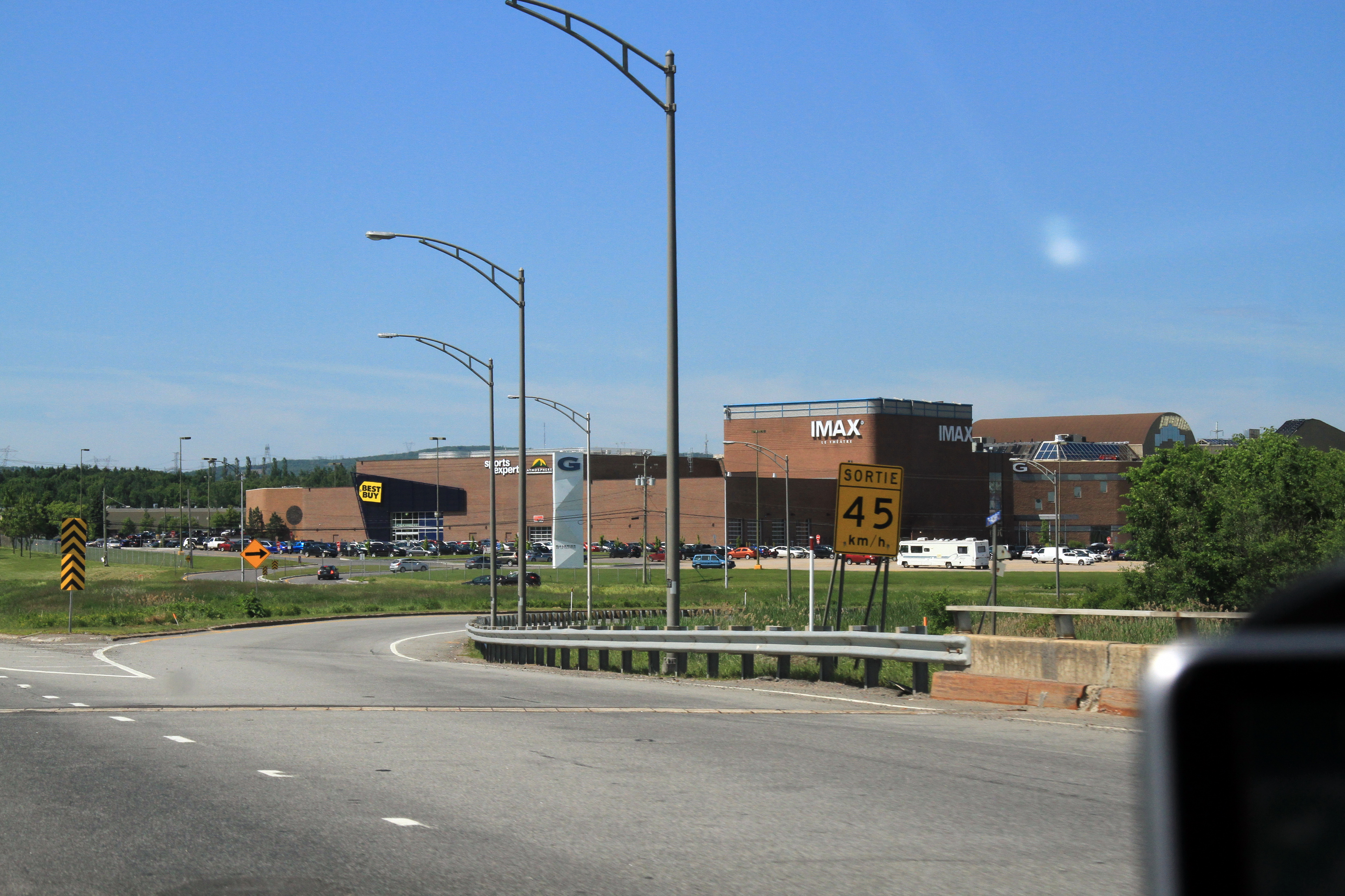 Les Galeries de la Capitale, vues de l'Autoroute Robert-Bourassa (A740) Nord